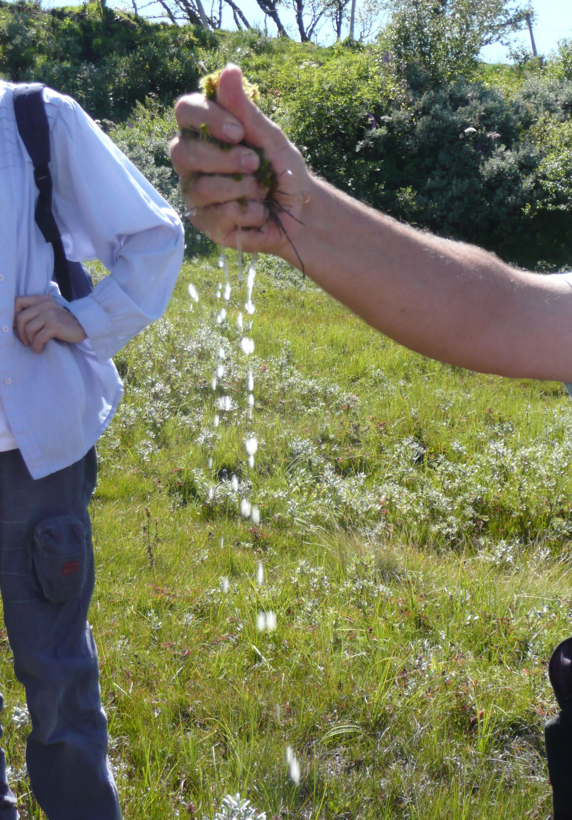 Une poignée de Sphaignes (Sphagnum sp.) pressée par Eric Vallet dans la Réserve naturelle de la vallée de Chaudefour pour démontrer la quantité d'eau retenue par les Sphaignes. Plante identifiée par le Conservateur de la réserve, Eric Vallet, lors d'une visite organisée d'une journée dans la reserve. Map: 45° 32' 11" N 02° 51' 10" E